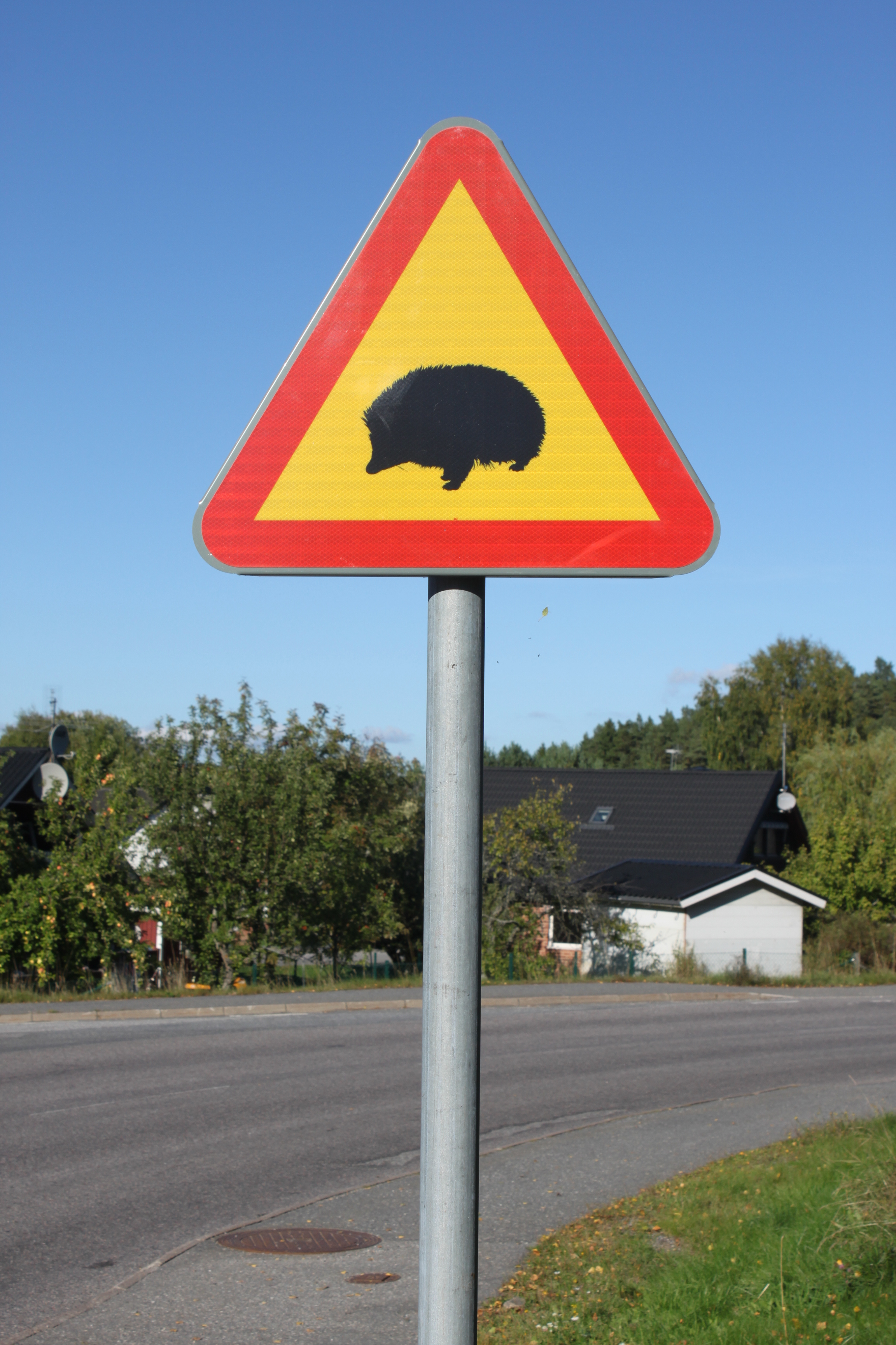 Vägmärke som varning för Igelkott. Hölö. 6 september 2013.